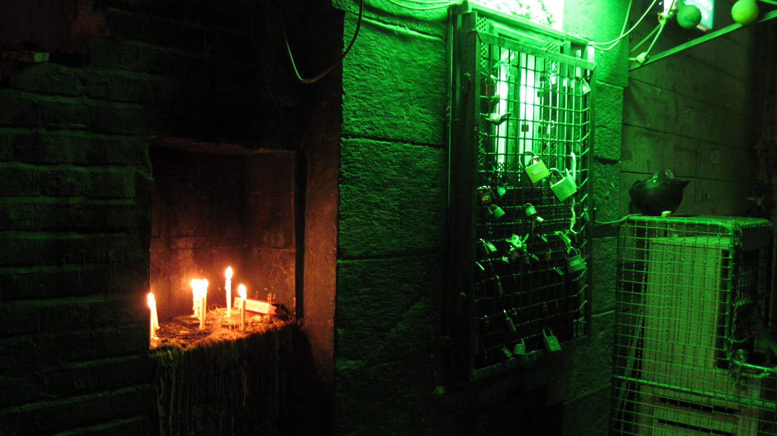 سقاخانه ای در حوالی میدان خراسان - سال 1390 - این سقاخانه در آذر 1390 به دلیل تجدید بنای ساختمان از میان رفت